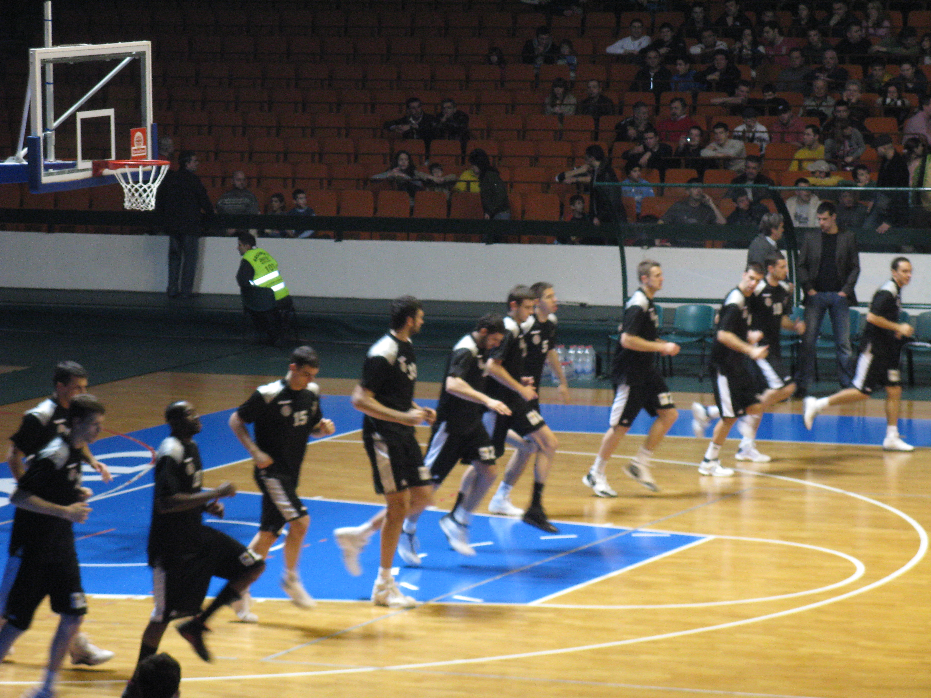 Tim Partizana u sezoni 2008/09: Jan Vesely, Strahinja Milošević, Stephane Lasme, Čedomir Vitkovac, Slavko Vraneš, Petar Božić, Novica Veličković, Milenko Tepić, Žarko Rakočević, Uroš Tripković, Aleksandar Rašić, Vukašin Aleksić